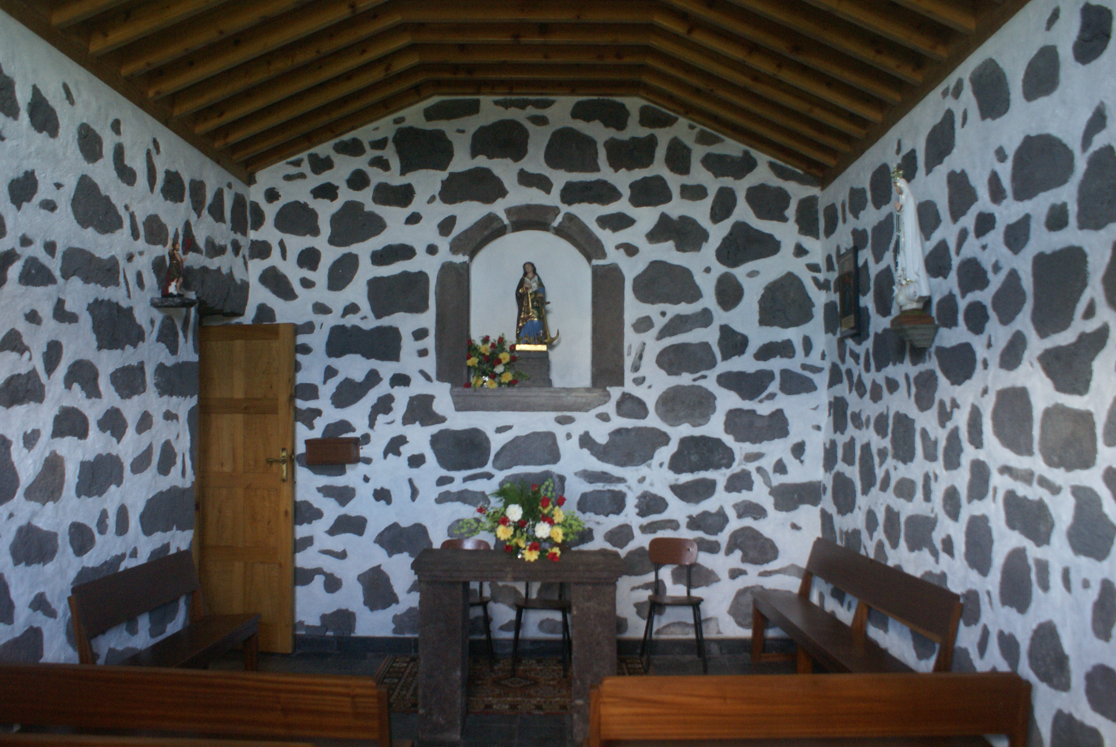 Fajã da Penedia, Ermida de Santa filomena, interior, Norte Pqueno, Calheta, ilha de São Jorge, Açores